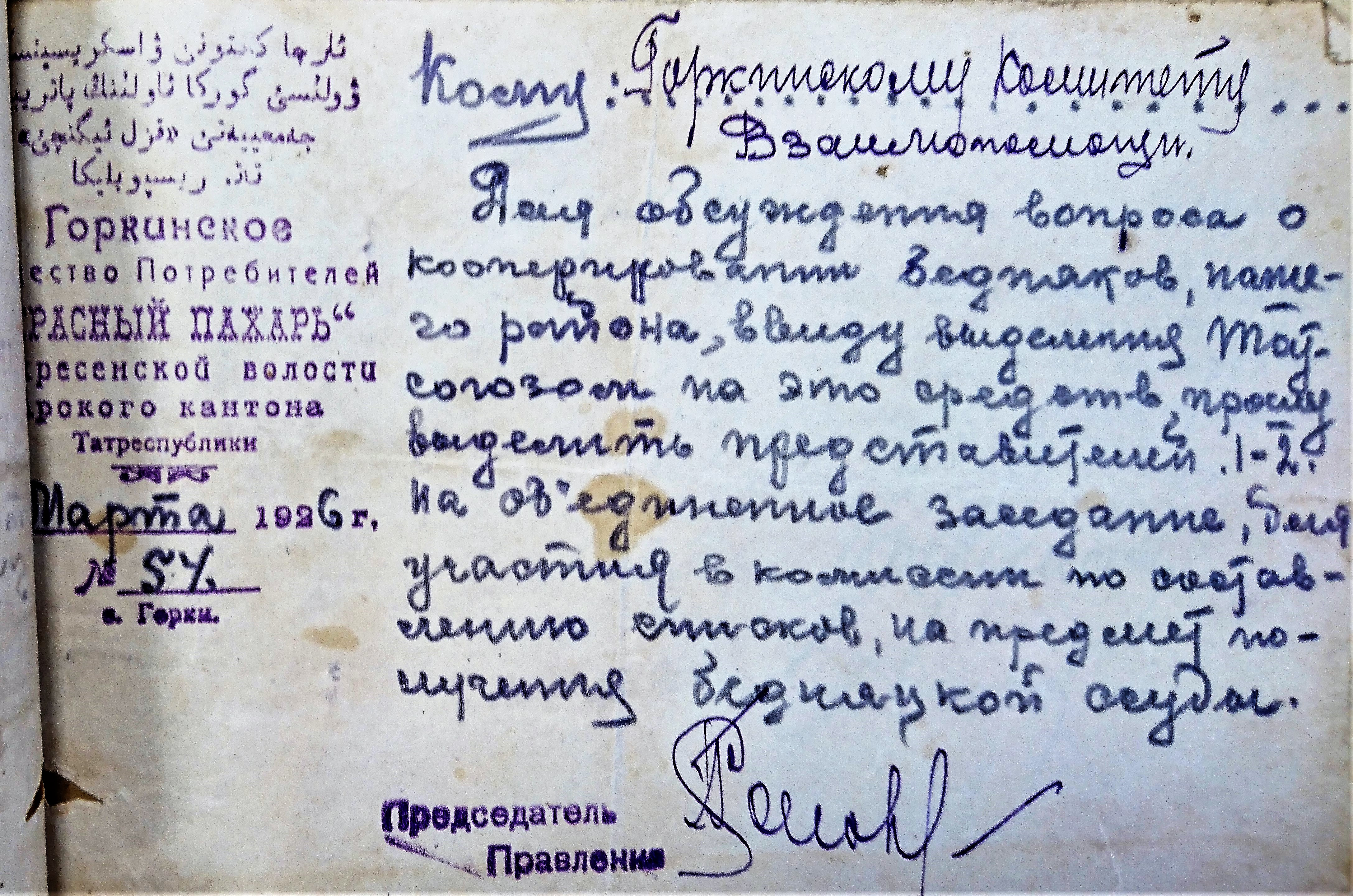 Обращение Горкинского общества потребителей "Красный пахарь" (март 1926 год) /Государственный архив Республики Татарстан, фонд Р-1911 (Горкинский сельсовет 1922-1928)/